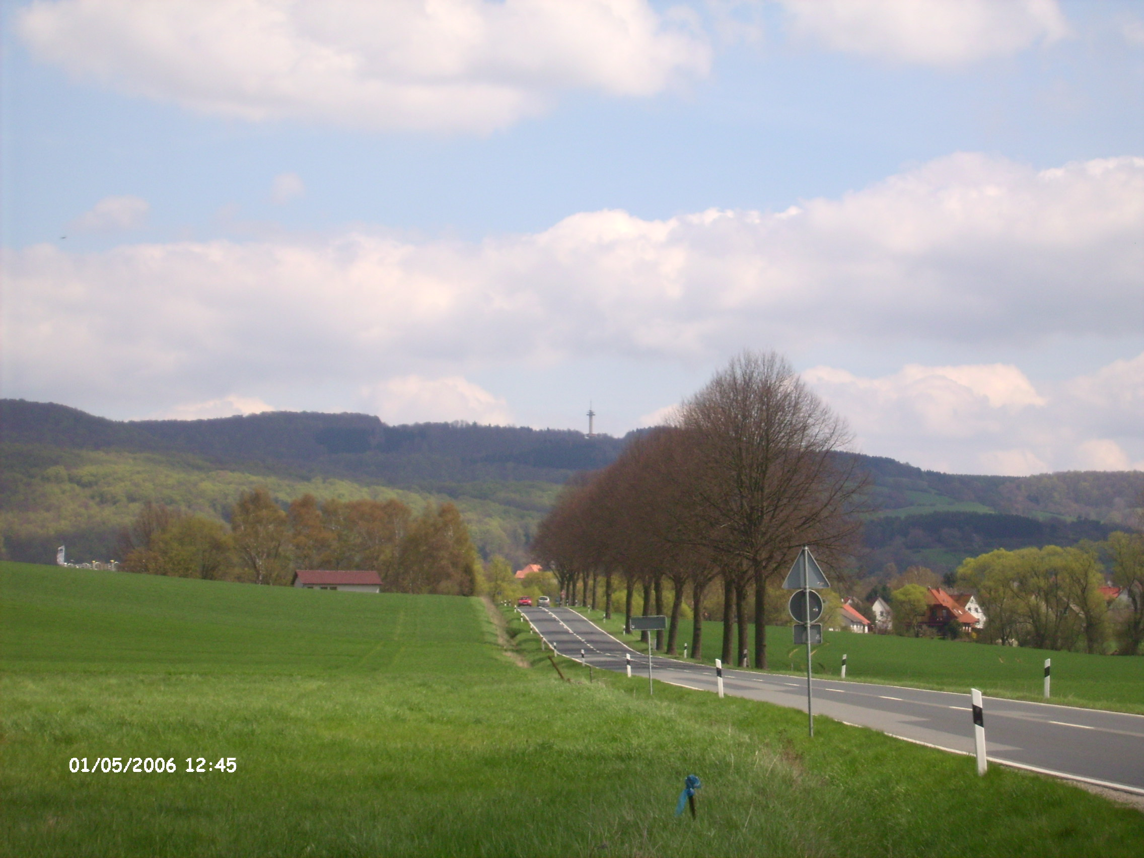 Hoher Hagen, Blick von Scheden zum Hohen hagen, Germany